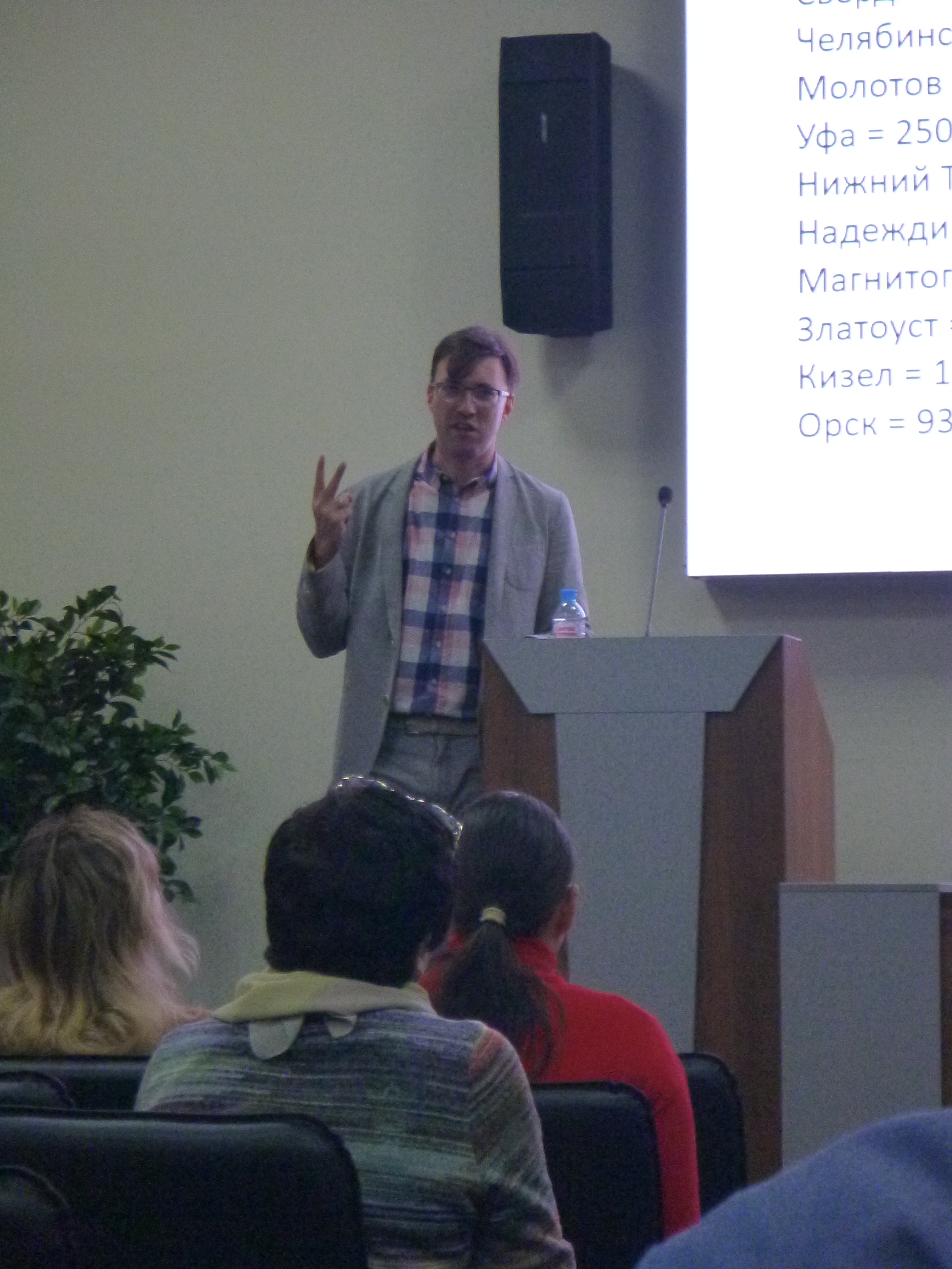 Доктор исторических наук Константин Дмитриевич Бугров читает лекцию в парке Россия моя история, Екатеринбург, 29 августа 2019 года